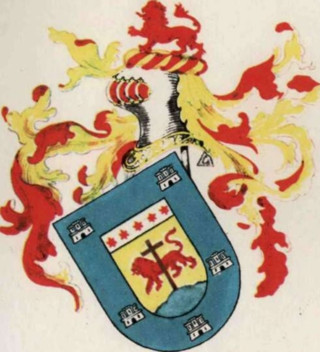 Brasão de Duarte Coelho — O Rei D. João III conferiu-lhe este brasão, em 1545, como prêmio aos serviços prestados no Oriente e em Pernambuco. Os cinco castelos lembram as cinco povoações por ele fundadas, das quais conhecemos apenas Igaraçu, Olinda e Paratibe. (Desenho segundo a descrição existente no vol. III da História da Colonização Portuguesa do Brasil.)